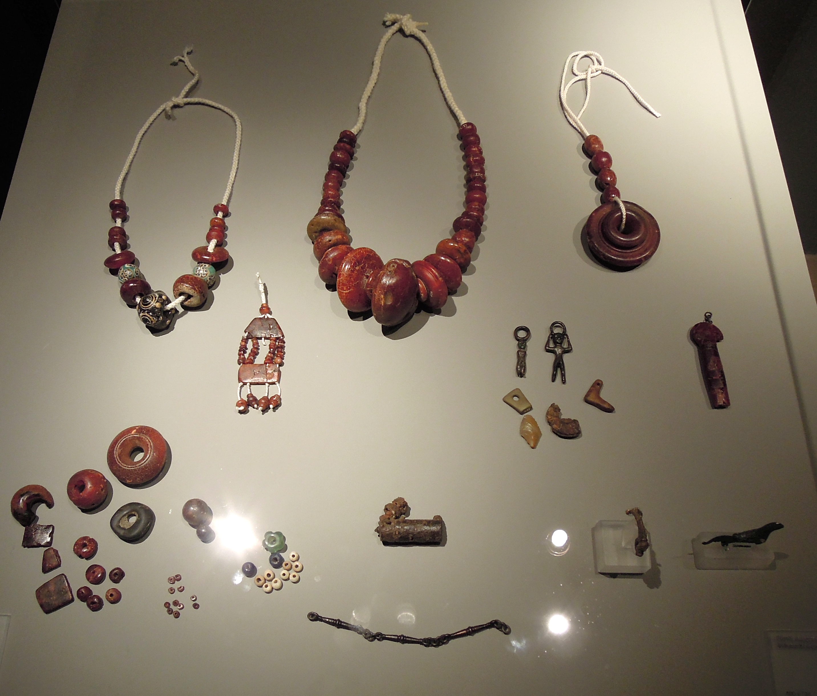 Vor- oder Frühgeschichtlicher Fund aus dem Saarland